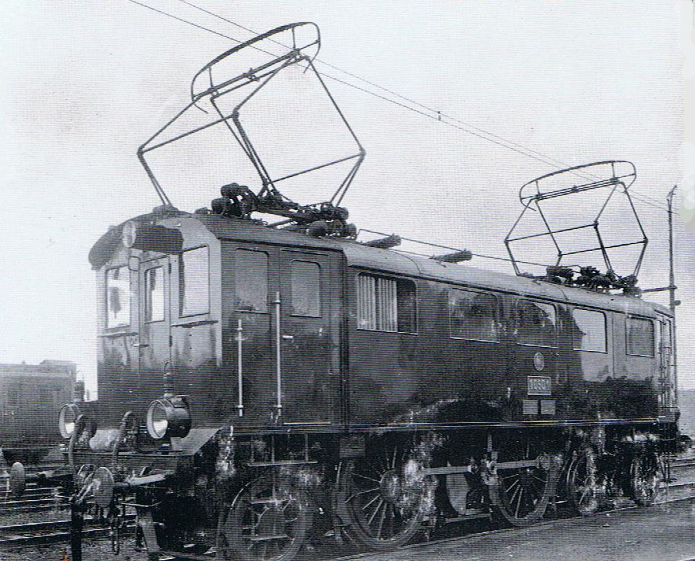 Preußische Elektrolokomotive ES 1 Halle, Aufnahme Jahr 1911